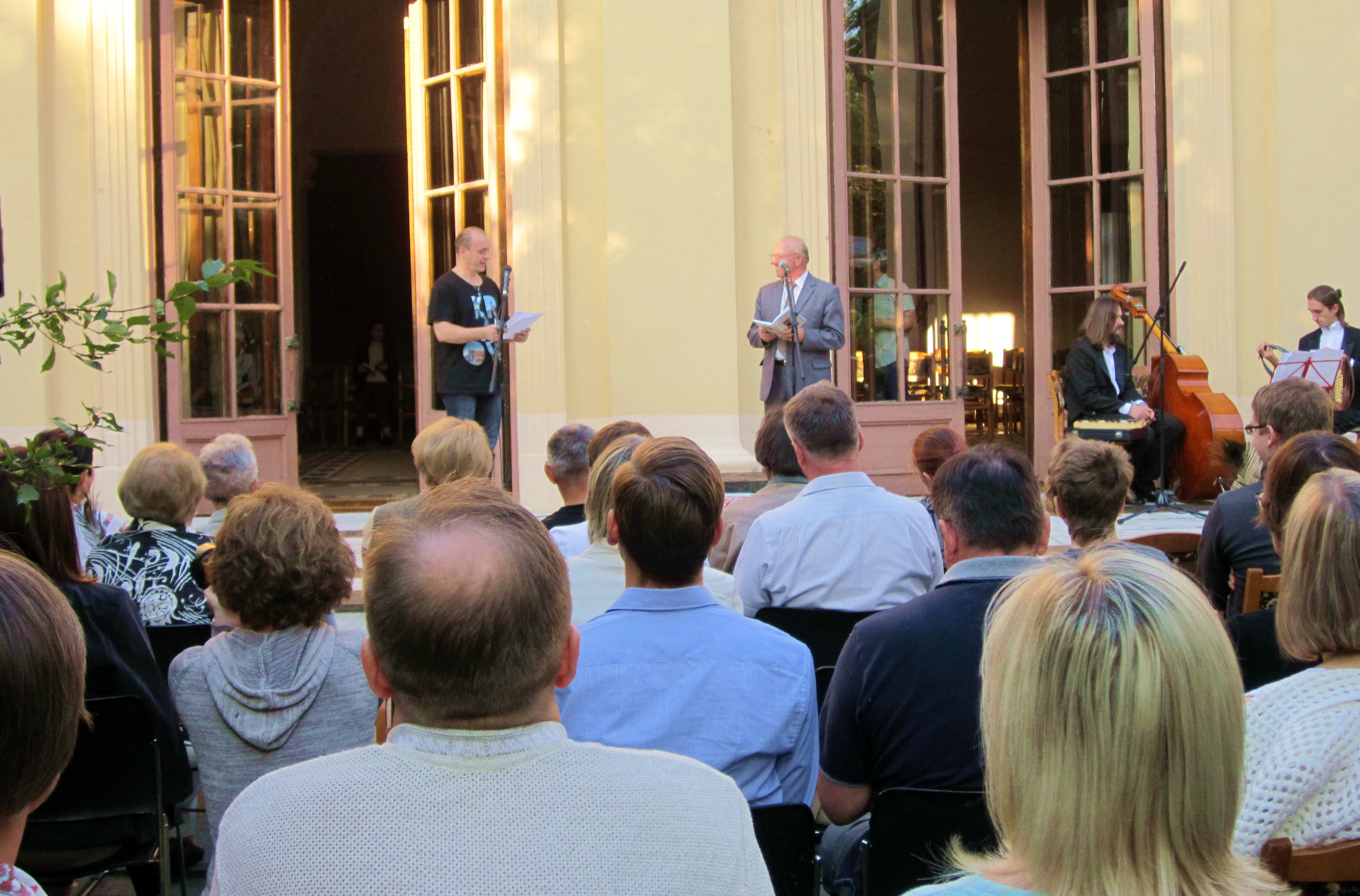 Narodowe Czytanie w Mińsku. Pierwsze wspólne polsko-białoruskie czytanie „Wesela” Stanisława Wyspiańskiego pod hasłem „Literatura ponad granicami”. Organizator wydarzenia - Instytut Polski w Mińsku. Dziennikarz Aleh Gruszecki przeczytał swoją rolę z byłym Wiceministrem Kultury Republiki Białorusi Panem Tadeuszem Strużeckim